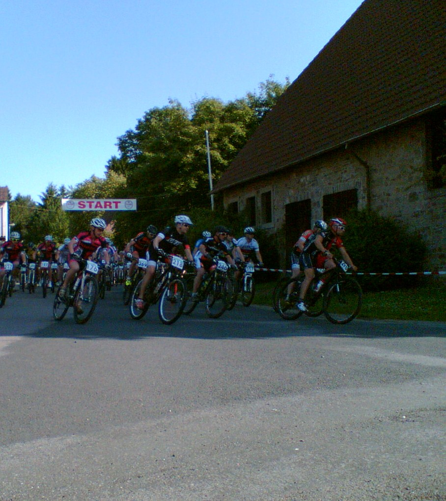 Nach dem Start zur Mitteldistanz beim Allersheimer Mountainbike-Cup 2013 in Neuhaus im Solling